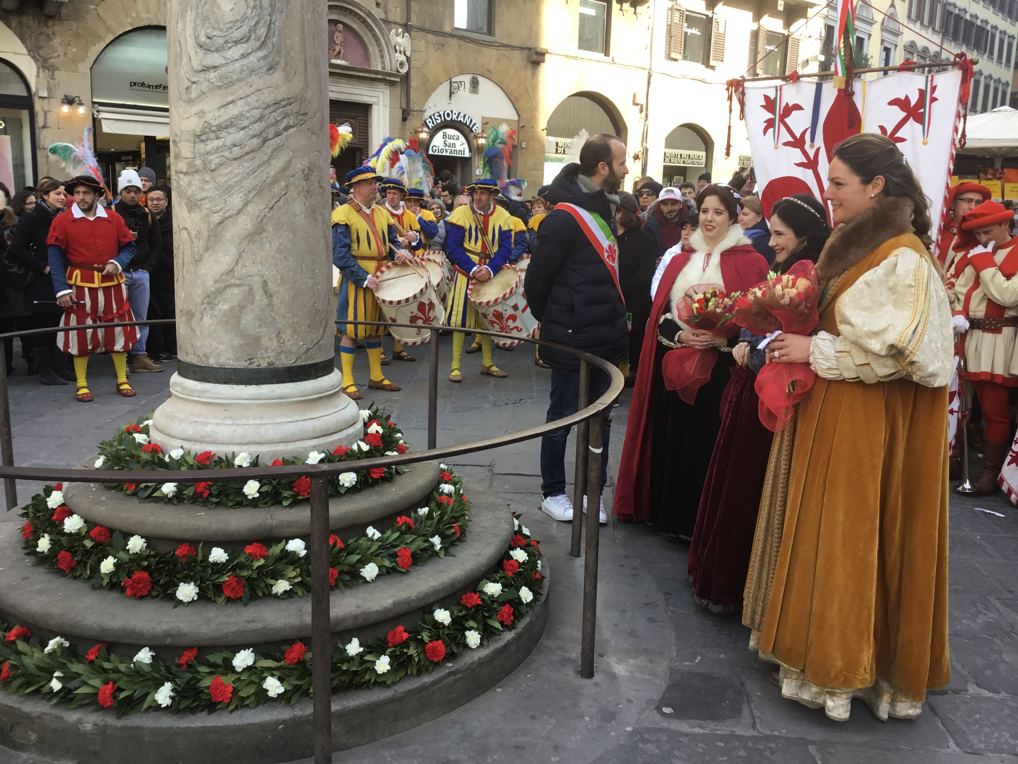 Infiorata di san Zanobi